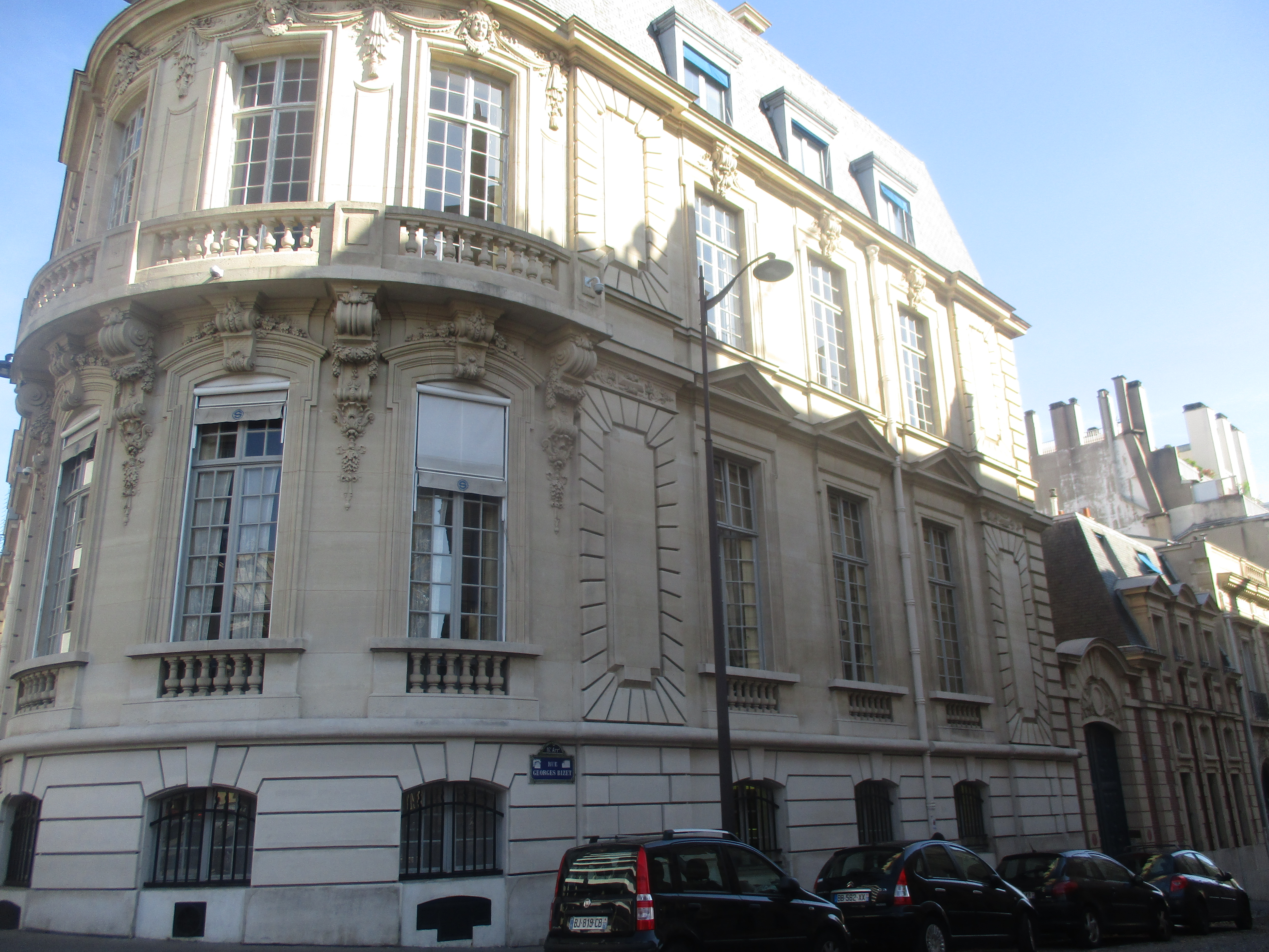 Hôtel Cahen d'Anvers, façade donnant avenue d'Iéna et rue Georges-Bizet, Paris XVIe.